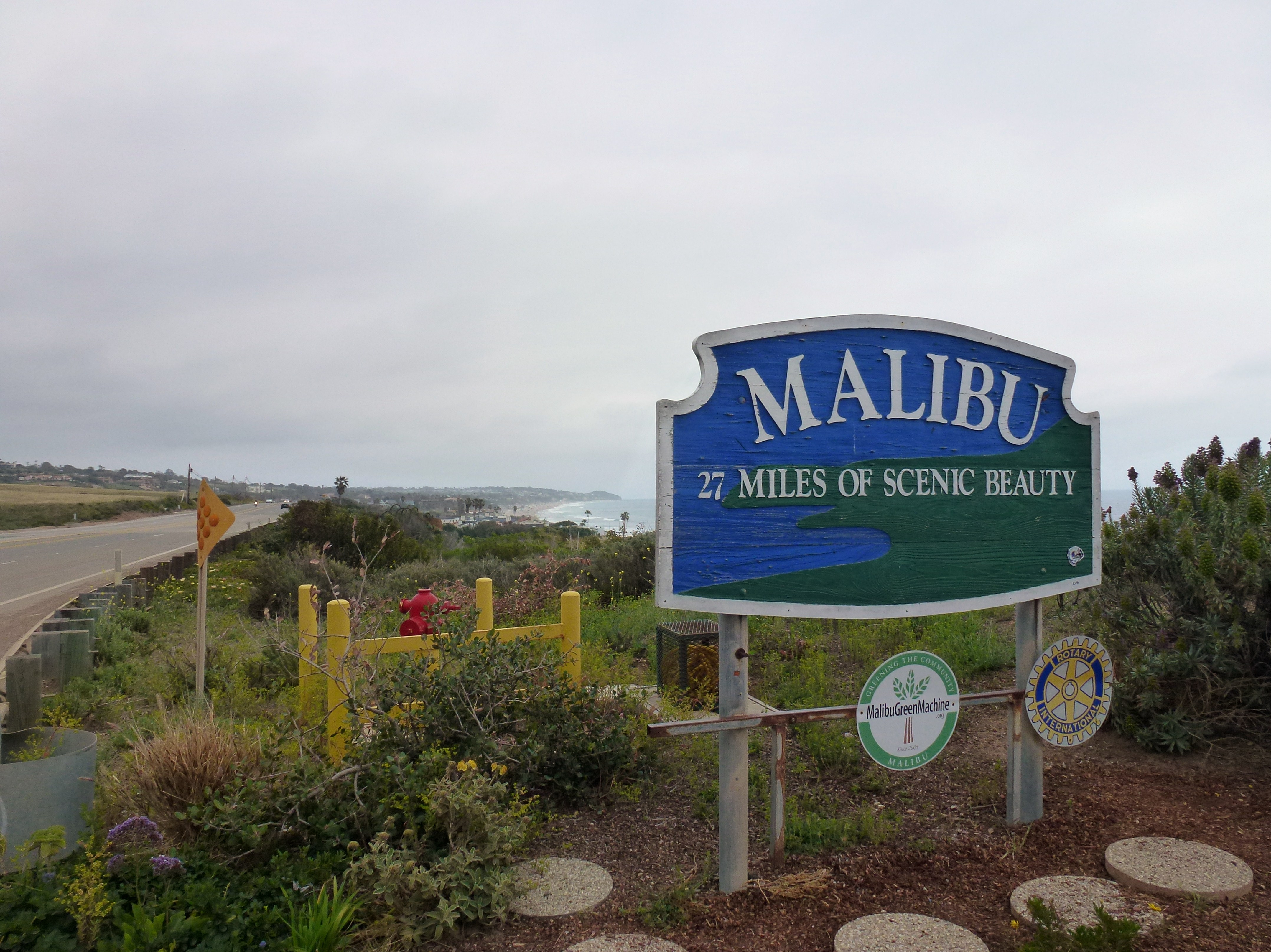 la plage de Malibu Californie (USA).